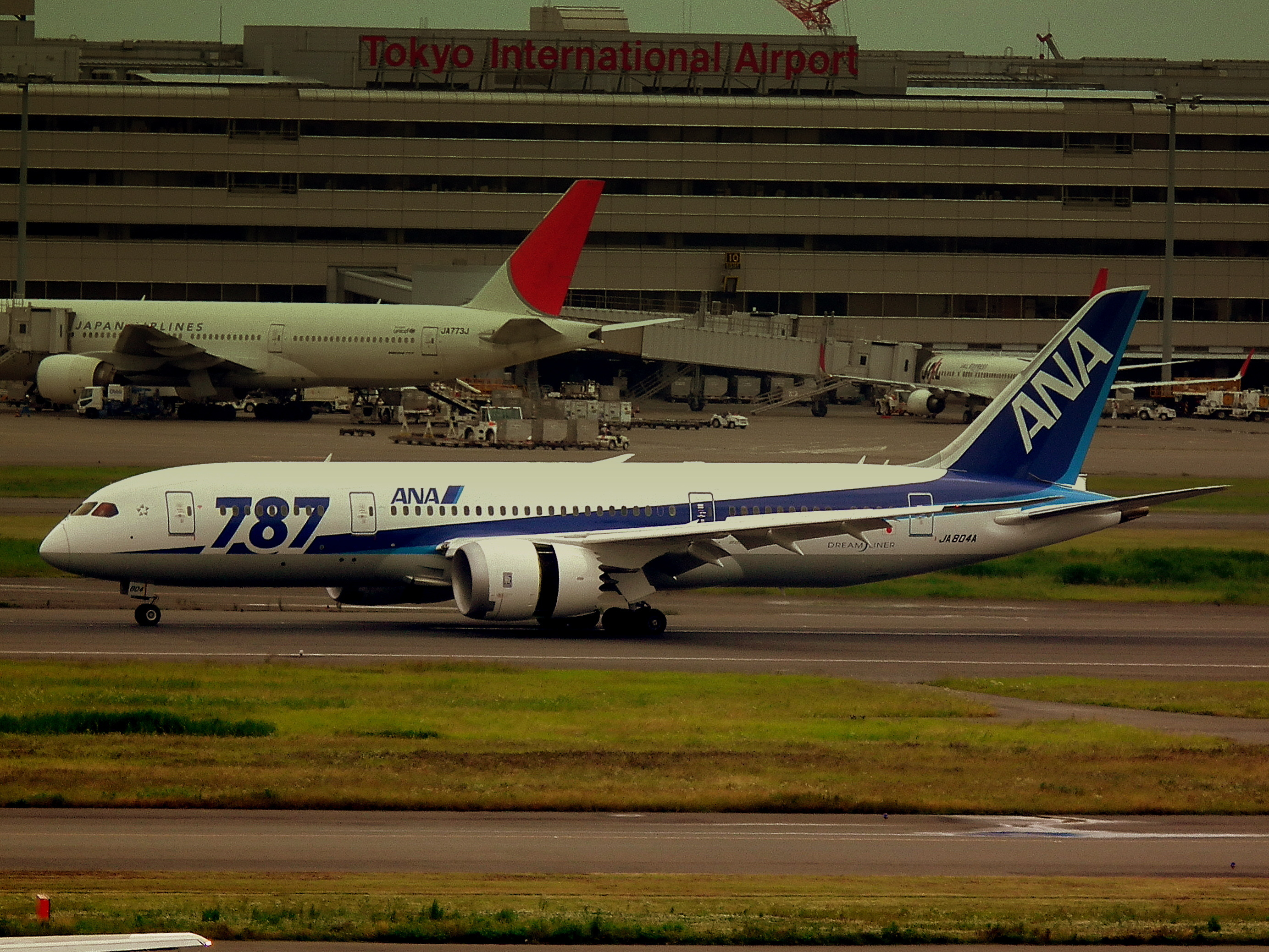 ALL NIPPON AIRWAYS BOEING 787-800 HANEDA AIRPORT TOKYO JAPAN JUNE 2012